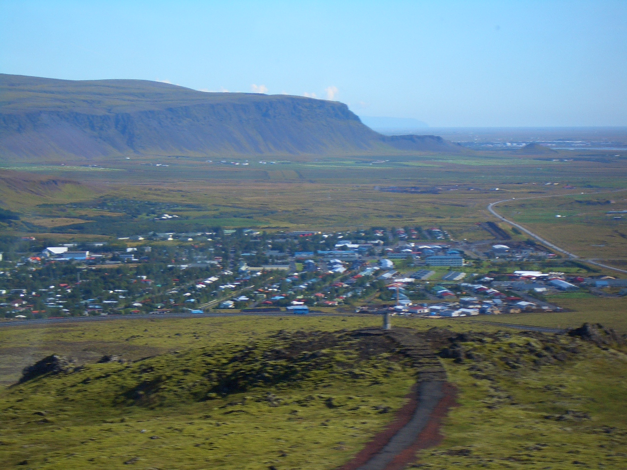 Photo taken by Showiki, September 2006.